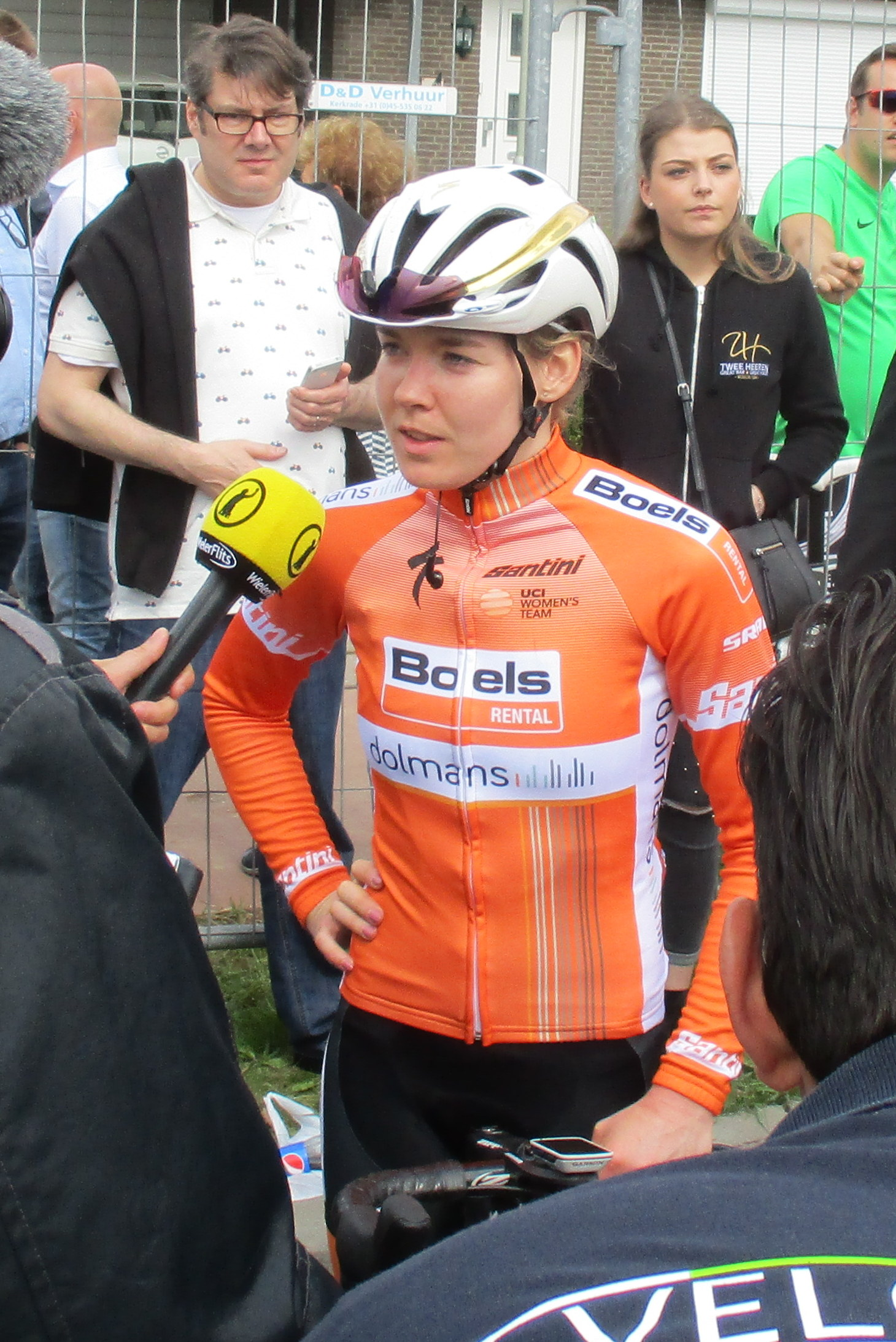 Finish van de Amstel Gold Race Ladies Edition 2018 in Berg, Valkenburg aan de Geul.